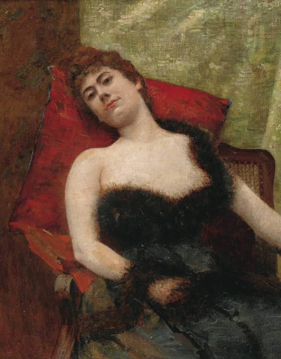 ArtistEnrico GambaTitle